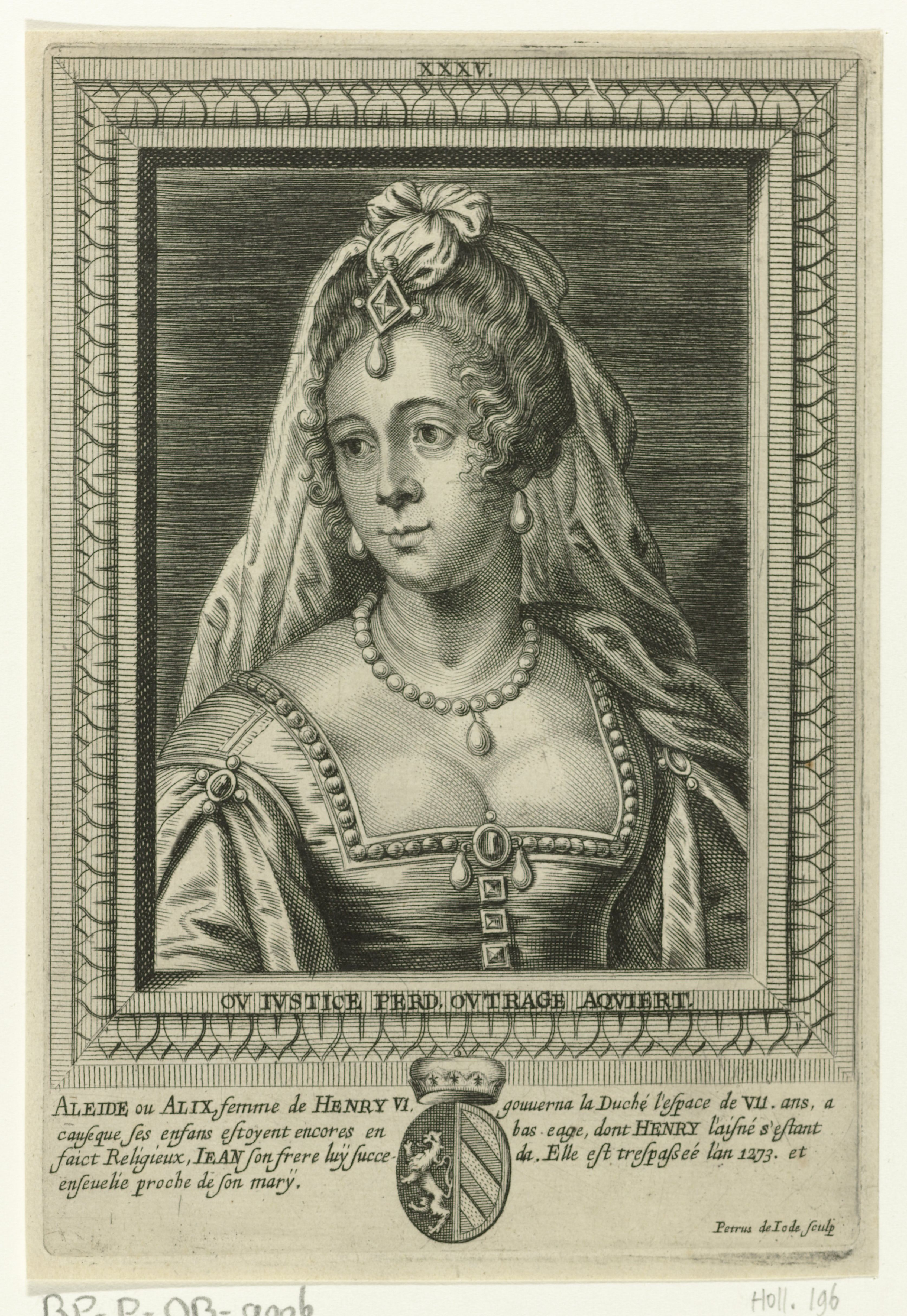 IdentificatieTitel(s): Portret van Aleida, gemalin van Hendrik VIObjecttype: prent boekillustratie Objectnummer: RP-P-OB-9006Catalogusreferentie: Hollstein Dutch 181-204Hollstein Dutch 105-158Opschriften / Merken: verzamelaarsmerk, verso, gestempeld: Lugt 2228Omschrijving: Busteportret van Aleida, met sluier. Ze draagt een parelketting en een jurk met laag uitgesneden decolleté. Het portret is gevat in een rechthoekige omlijsting met een motto in het Latijn. In de marge het wapenschild van de geportretteerde en een vierregelig onderschrift in het Frans. Prent uit een boek Waar: in 54 prenten met portretten.VervaardigingVervaardiger: prentmaker: Pieter de Jode (II) (vermeld op object)uitgever: Joannes MeyssensPlaats vervaardiging: AntwerpenDatering: na 1661 - 1663Fysieke kenmerken: gravure en etsMateriaal: papier Techniek: graveren (drukprocedé) / etsenAfmetingen: plaatrand: h 174 mm × b 117 mmToelichtingPrent uit: Joannes Meyssens, Les effigies des souverains princes et ducs de Brabant avec leur chronologie, armes et devises. Antwerpen: Joannes Meyssens, na 1661.OnderwerpWat: pearl; pearl necklace (+ women's clothes)Wie: Aleidis van BourgondiëVerwerving en rechtenVerwerving: onbekendCopyright: Publiek domein